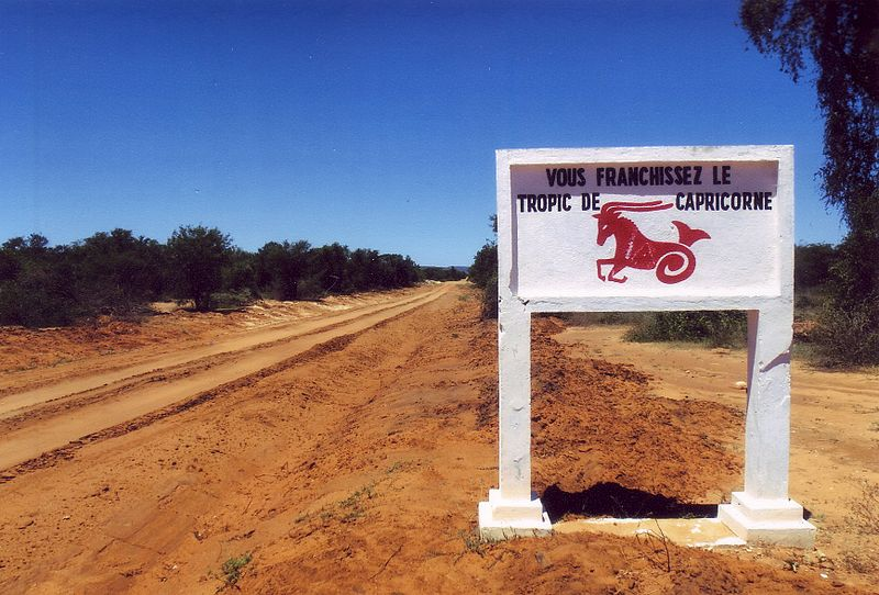 Tropico del capricorno, Madagascar, Regione di Atsimo-Andrefana